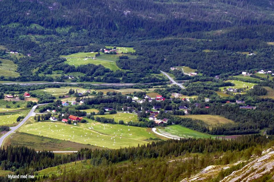 Panoramabilde over Nyland